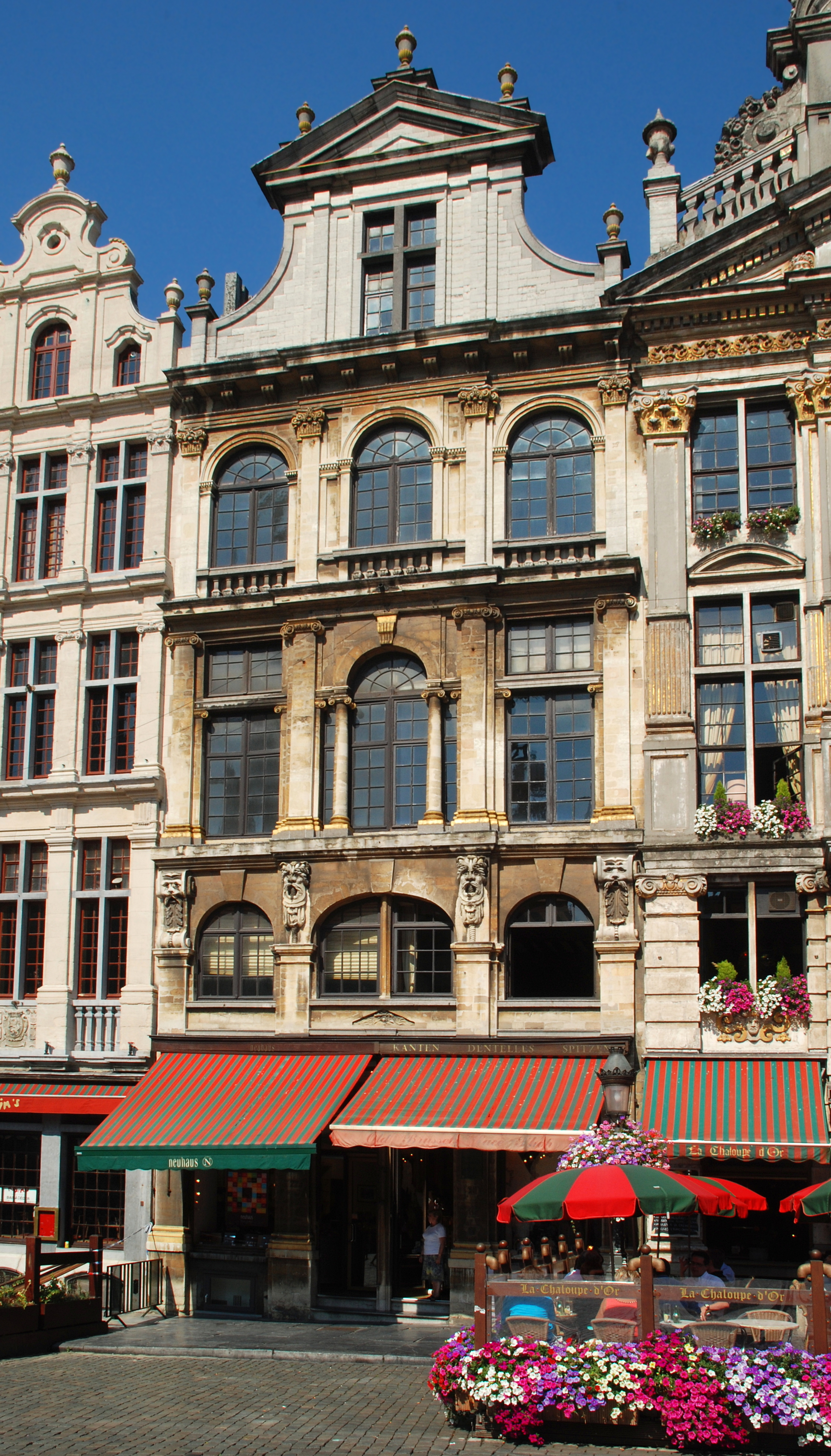 Belgique - Bruxelles - Grand-Place - Maison du Pigeon